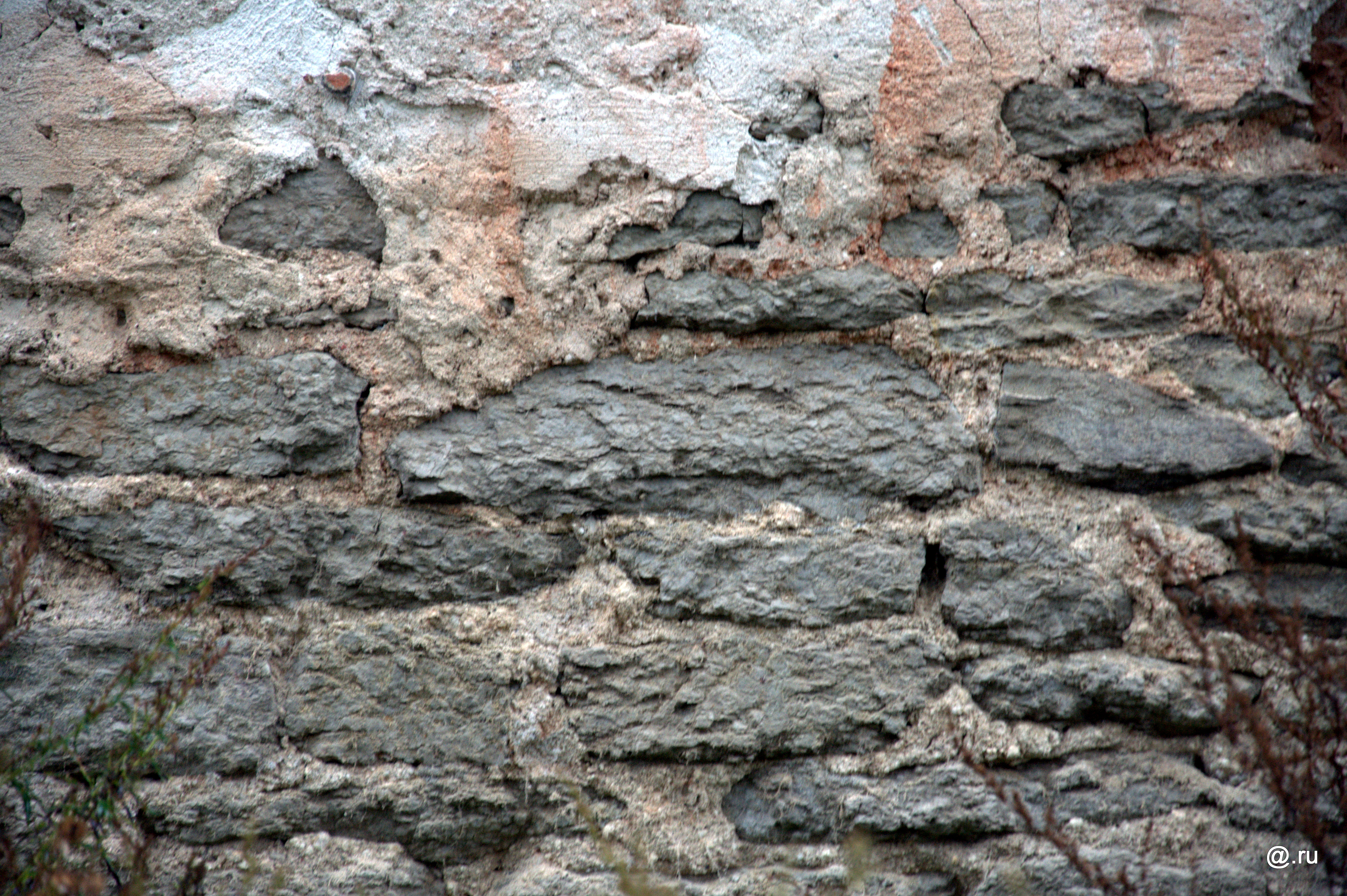 Школа земская (Псковская область, Псков, Школьная улица, 16-а)